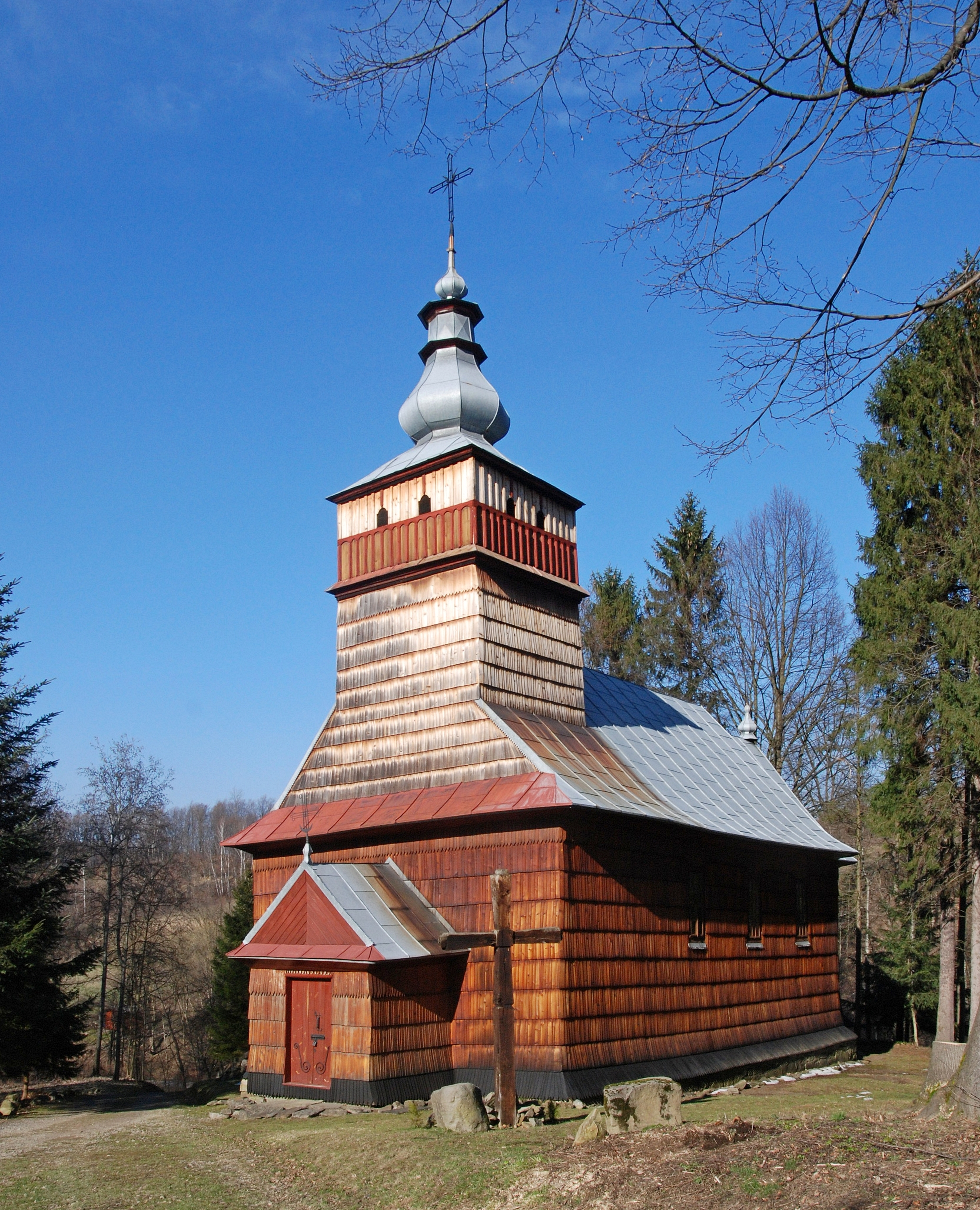 wieś Szymbark